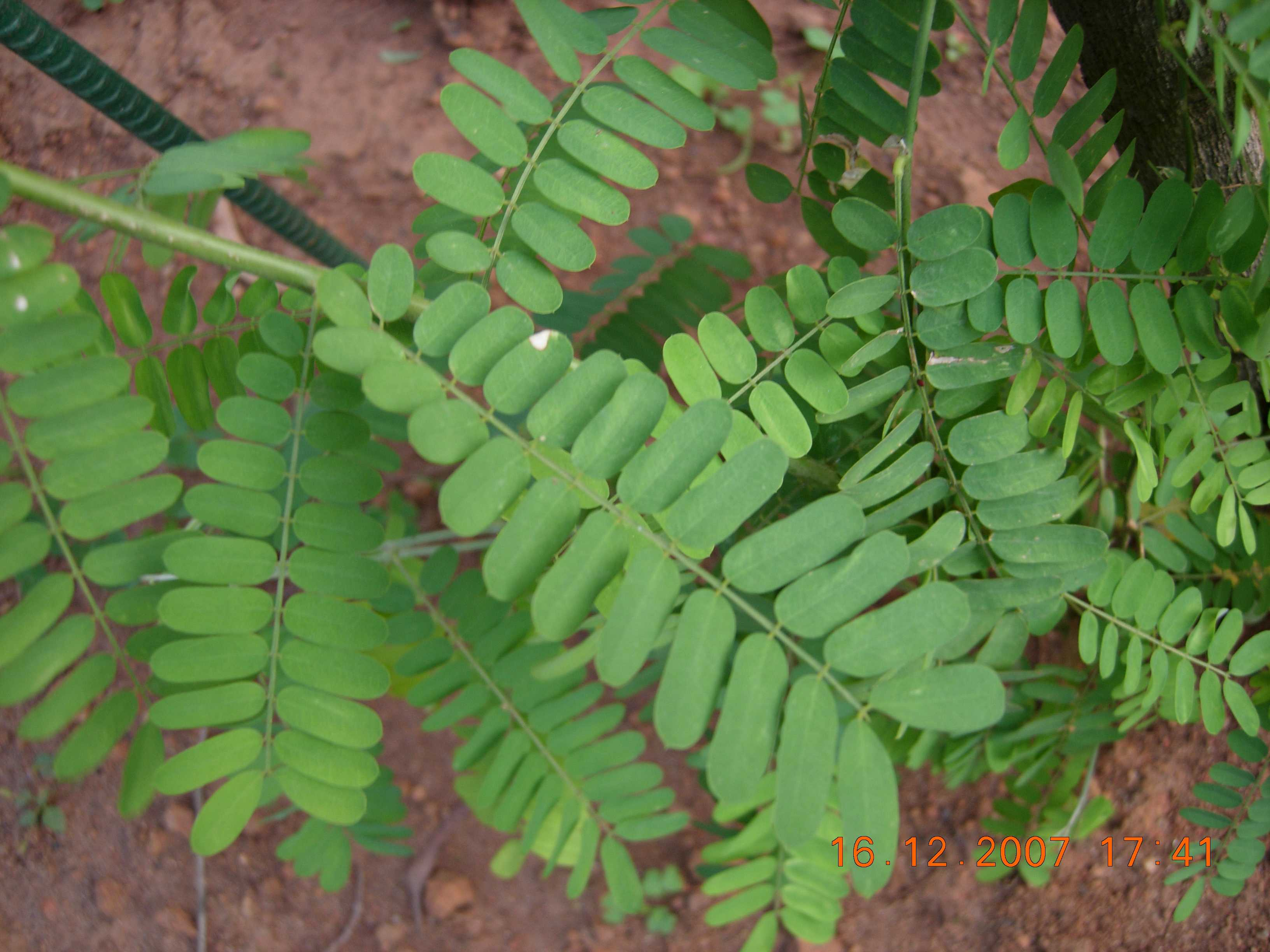 കുന്നി - തണ്ട്